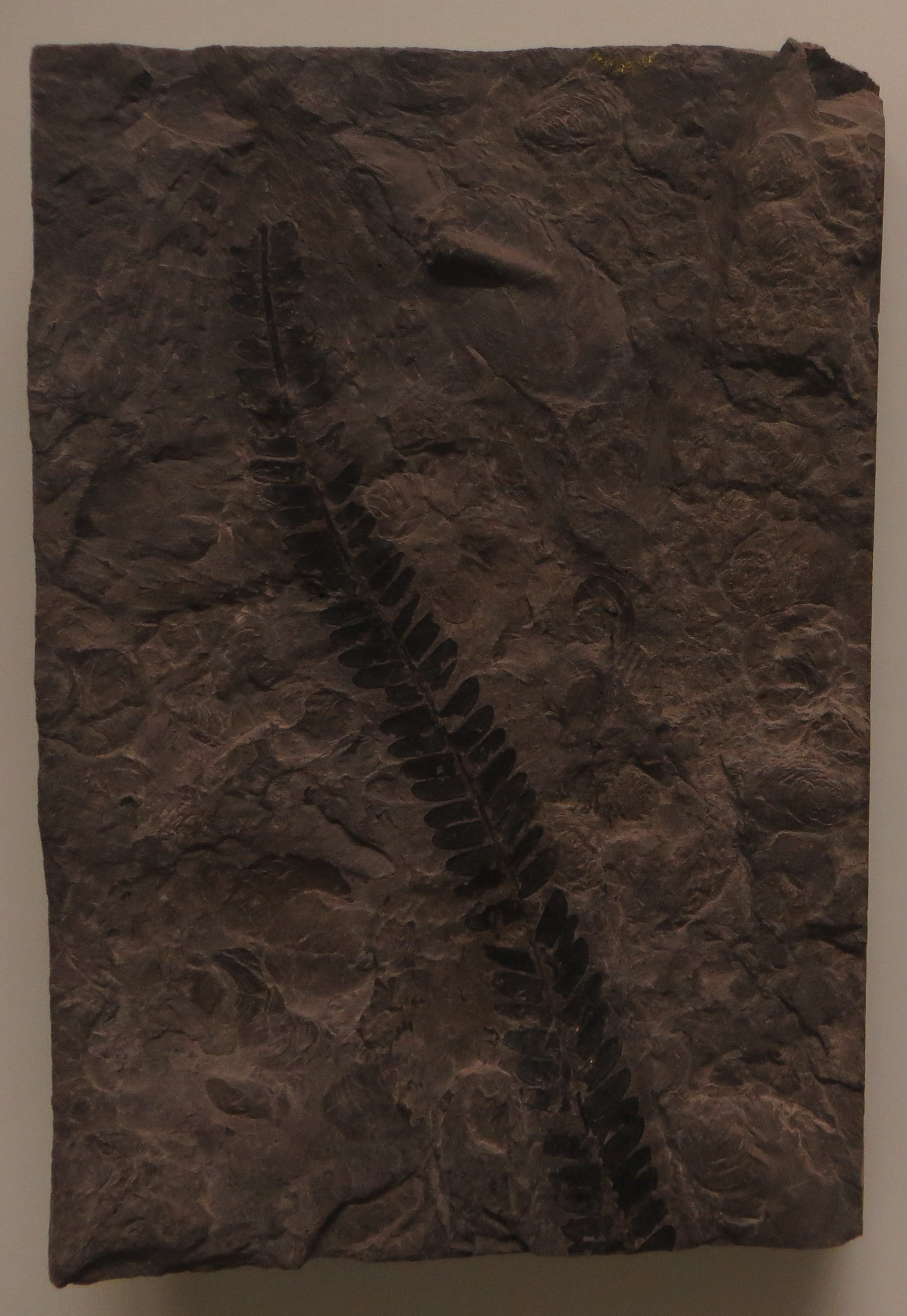 Fossil of Otozamites - Took the picture at Museum am Lowentor, Stuttgart